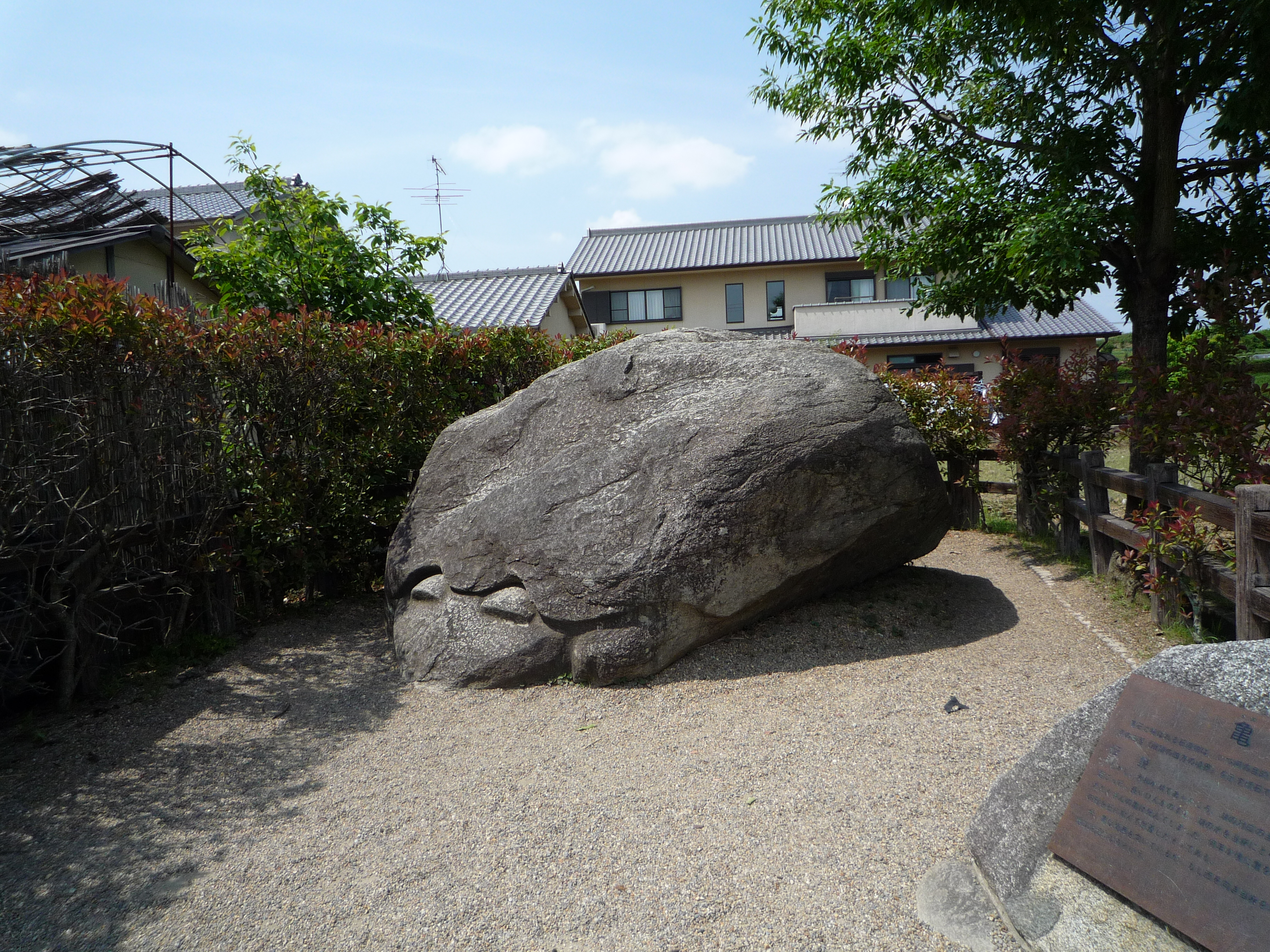 亀石（奈良県明日香村）